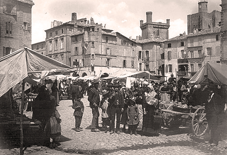 Le marché d'Uzès en 1890